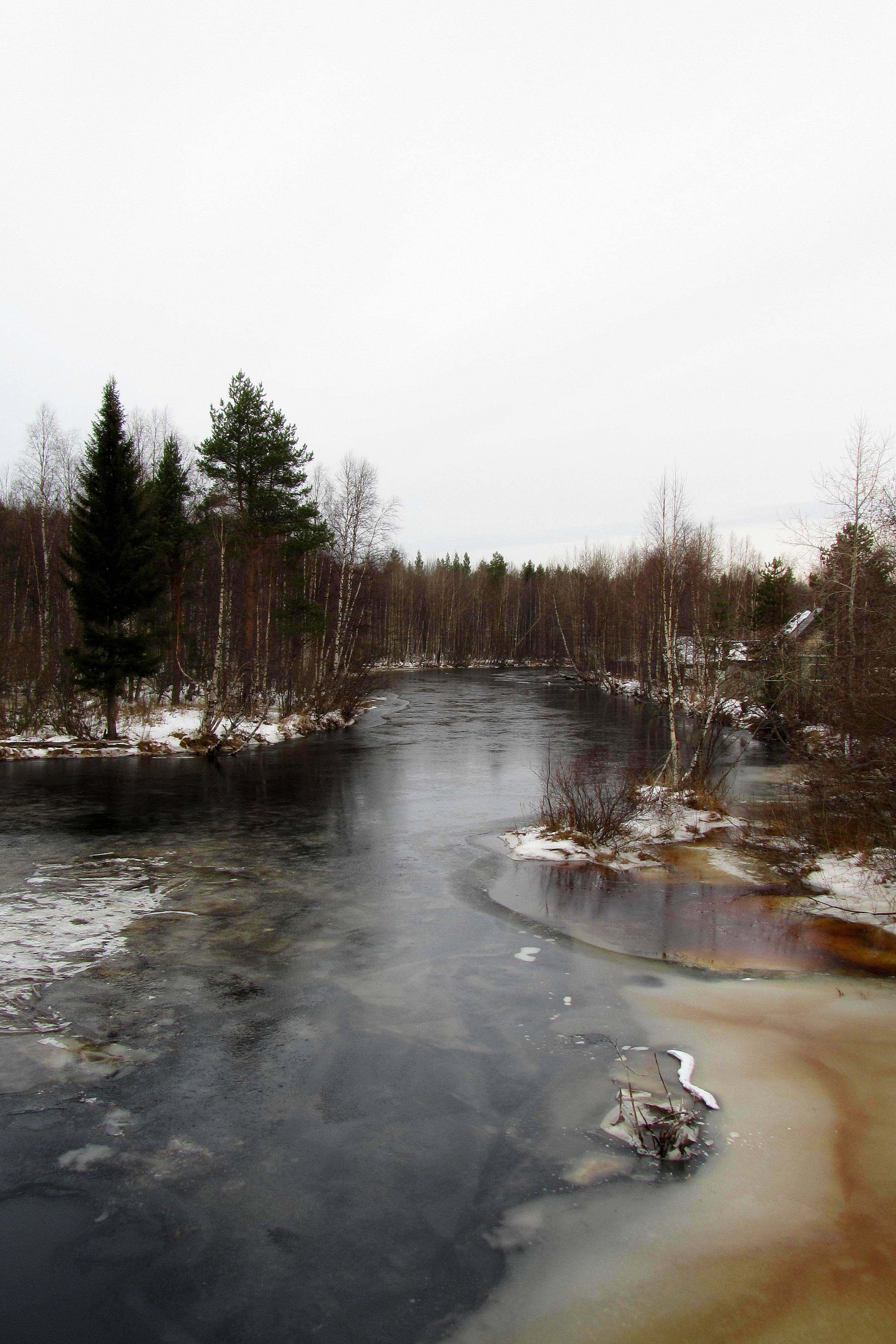 Река Ширшема. Муниципальное образование «Северодвинск»